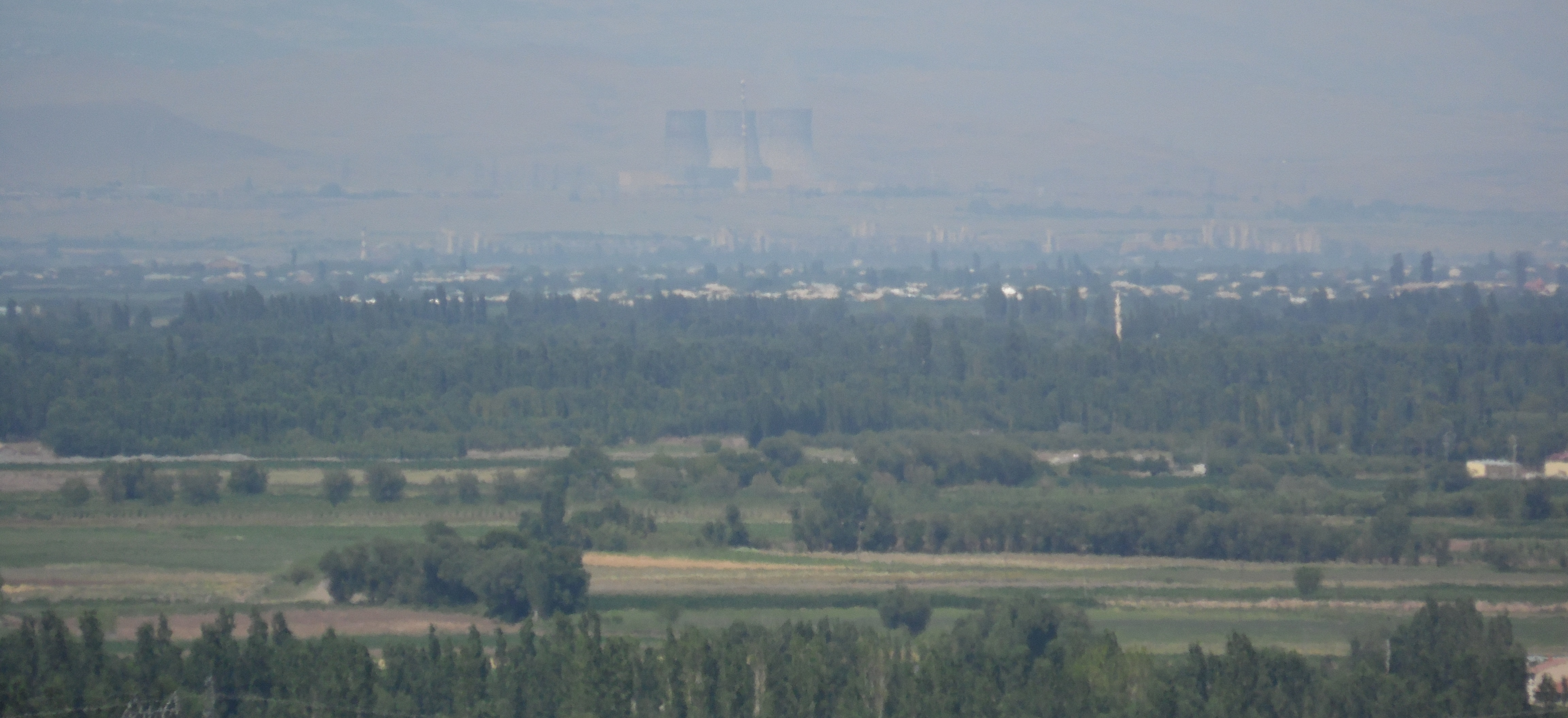 metsamor nükleer santrali